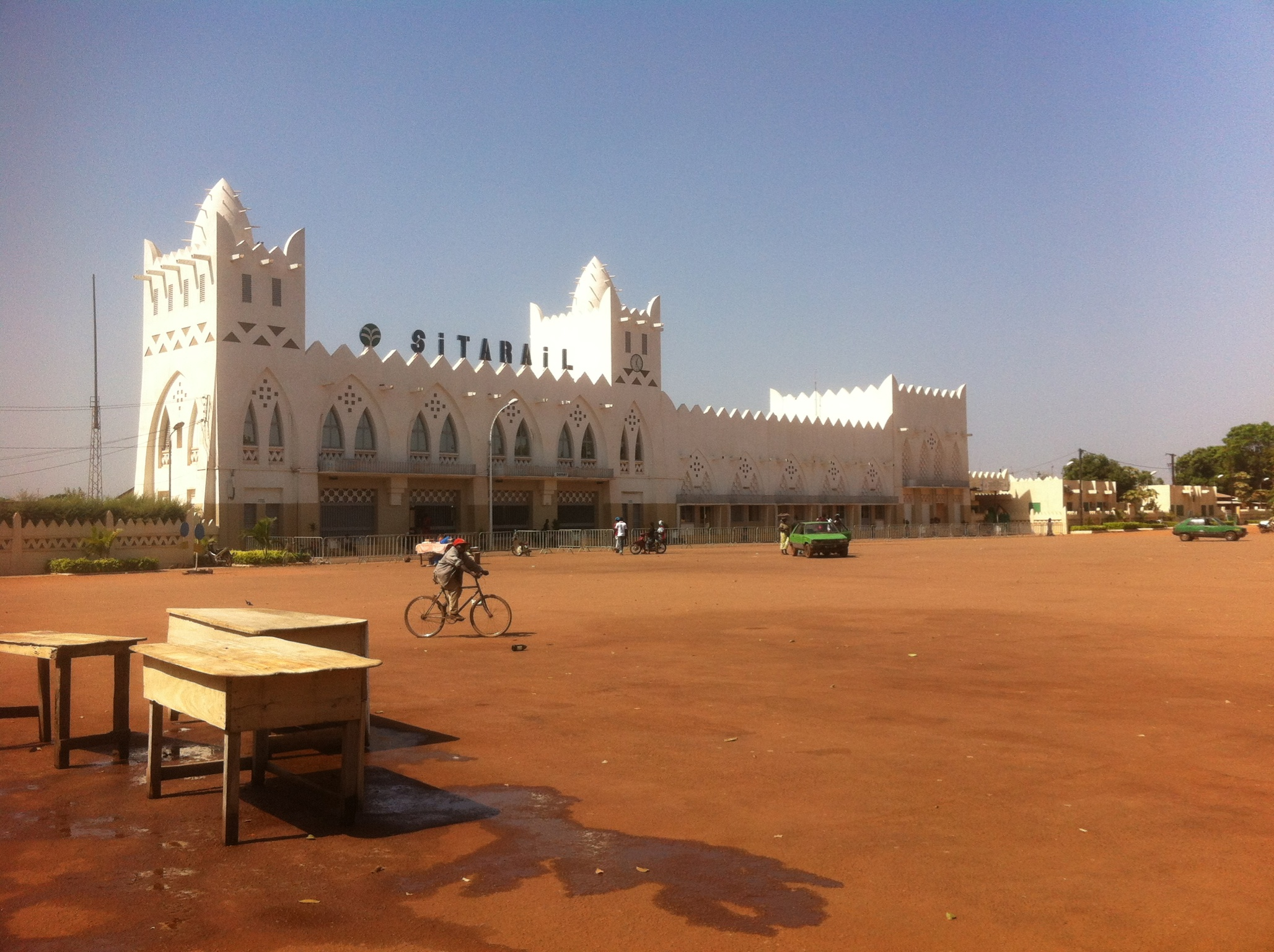 Gare de Bobo-Dioulasso de style art-déco.